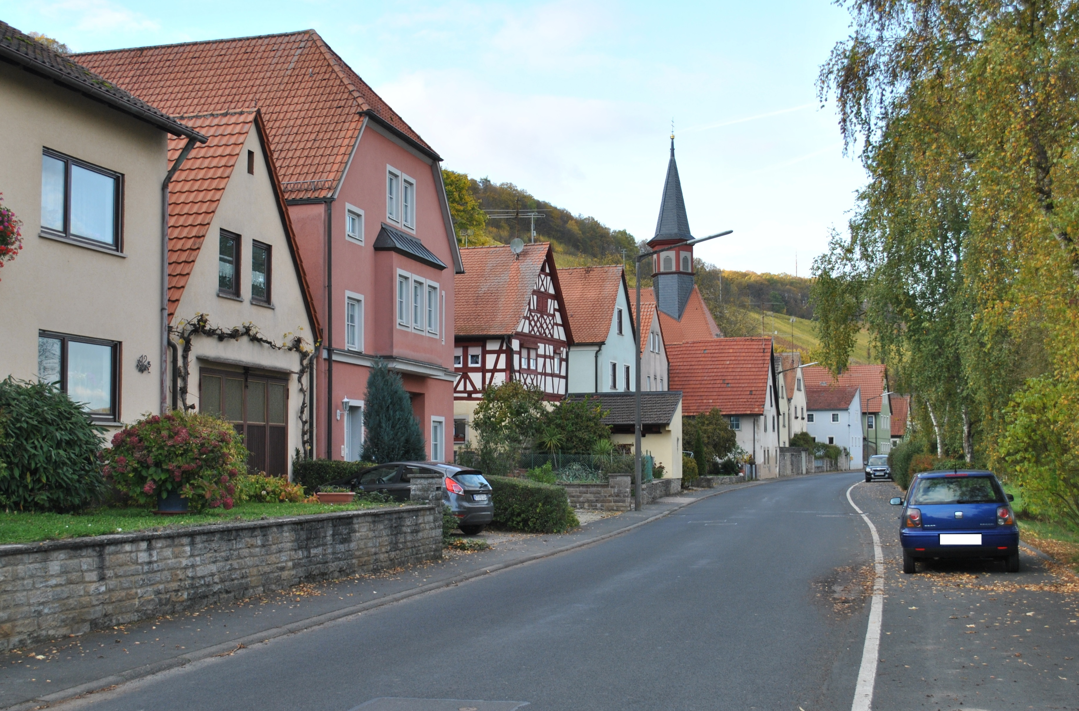 Köhler gesamt, Kreisstraße KT 31